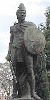 Imagen de estatua en honor a Xicohtencatl